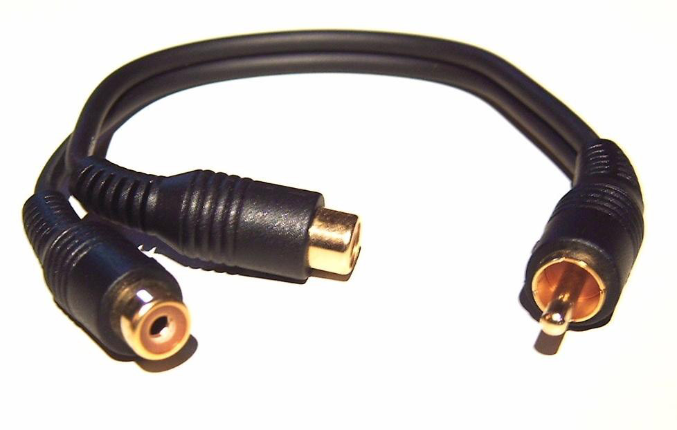 vergoldeter Cinch-Adapter (1x Stecker auf 2x Kupplung)